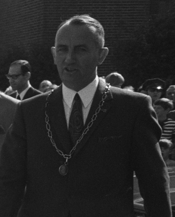 Werkbezoek van Prinses Beatrix en Prins Claus aan Overijssel, 1e dag Beatrix en Claus en burgemeester L. A. Verburg van IJsselmuiden